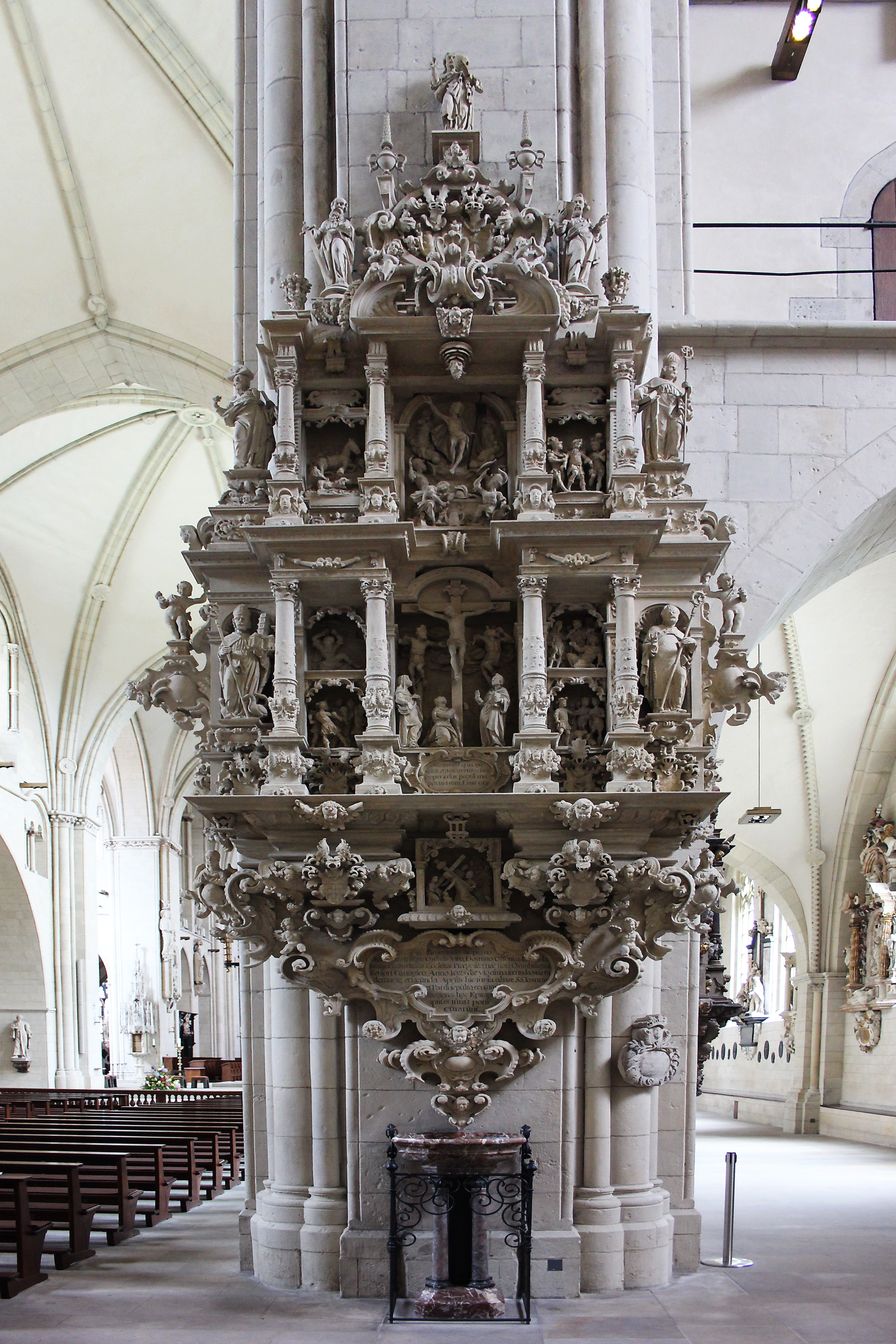 St. Paul's Dom in Münster